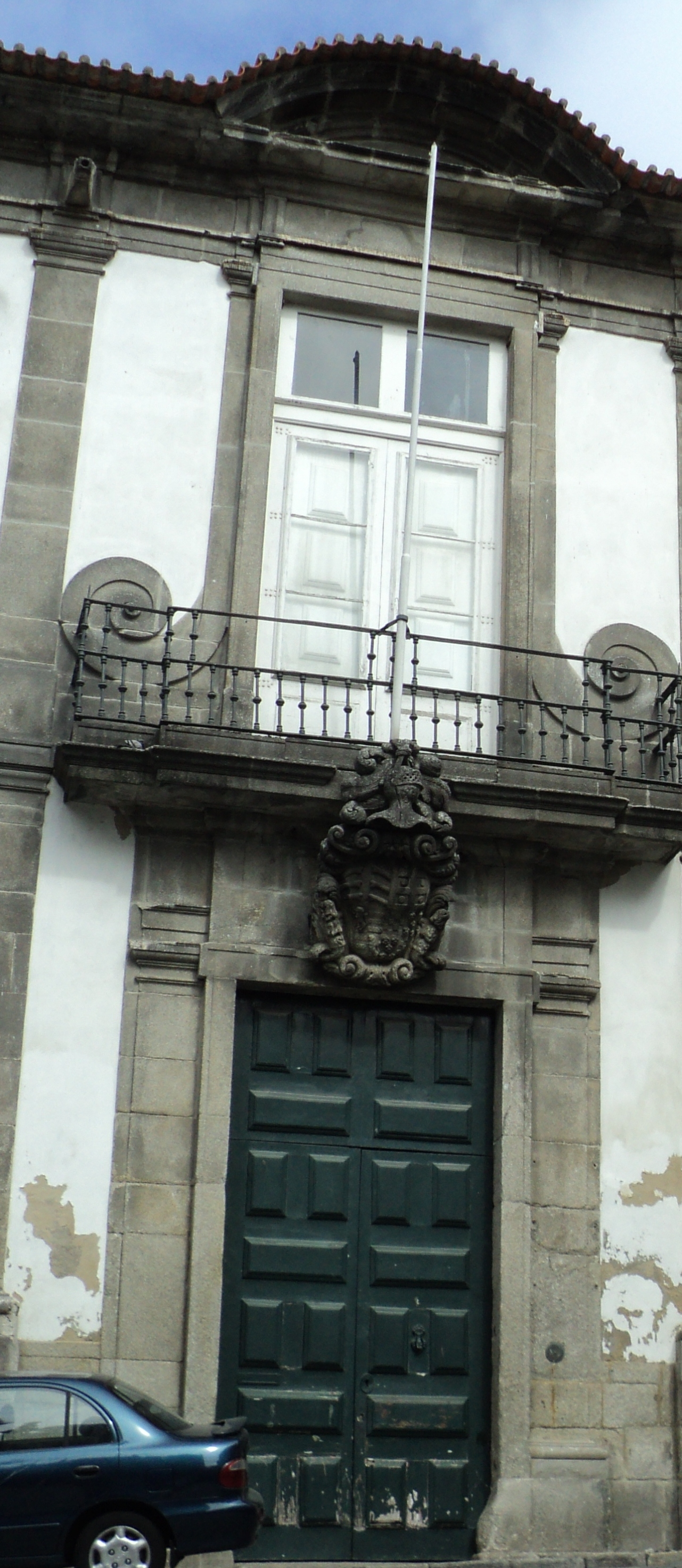 Palácio de São João Novo / Museu de Etnografia e História / Museu de Etnologia do Porto. Em Portugal, Porto, Porto, Miragaia. This file was uploaded for Wiki Loves Monuments in Portugal with the unique identifier 74816.